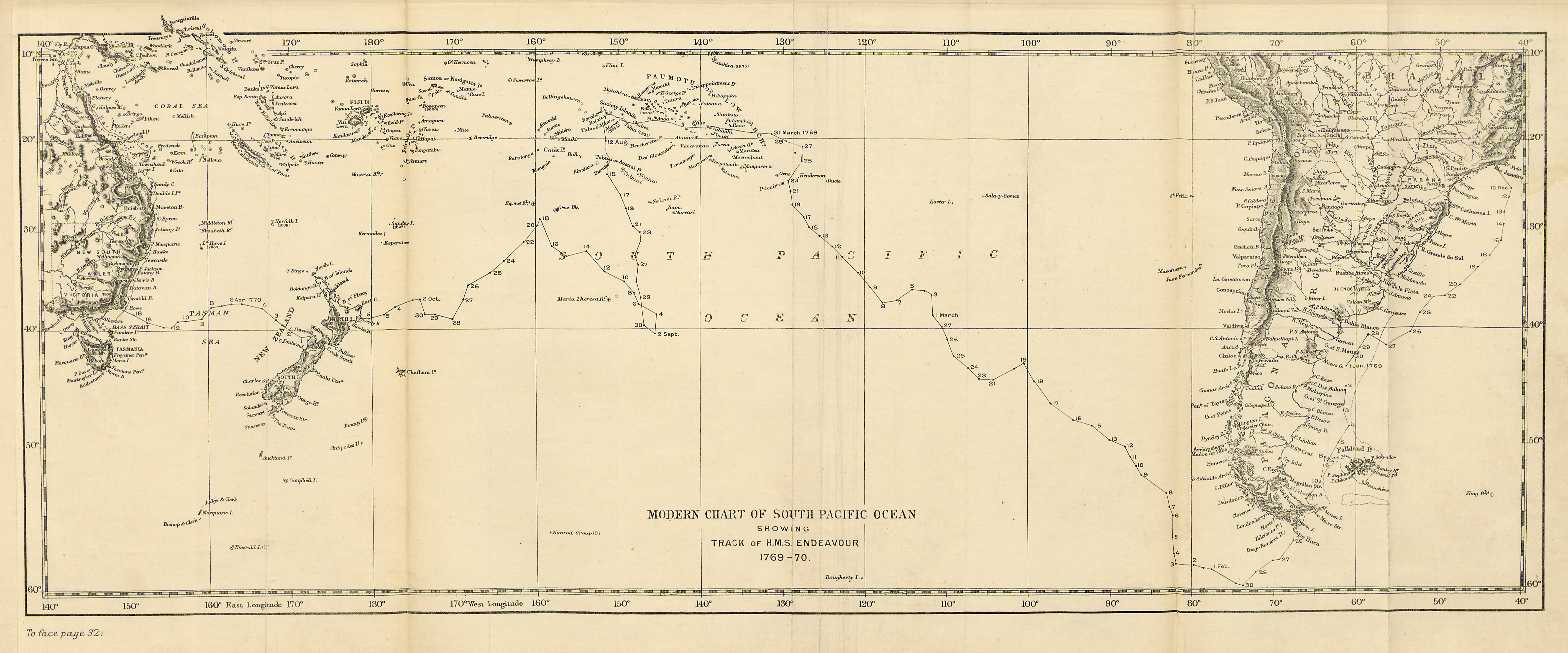 Grabado de I. Bayly para la edición de los diarios del primer viaje del teniente James Cook en el HMB Endeavour editada por William J.Ll. Wharton y publicada por Elliot Stock en 1893, Londres. Muestra la ruta realizada por el HMB Endeavour desde su salida de Río de Janeiro, Brasil, el 10 de diciembre de 1769 en el océano Atlántico sur hasta alcanzar la costa este de Australia en el mar de Tasmania el 18 de abril de 1770.